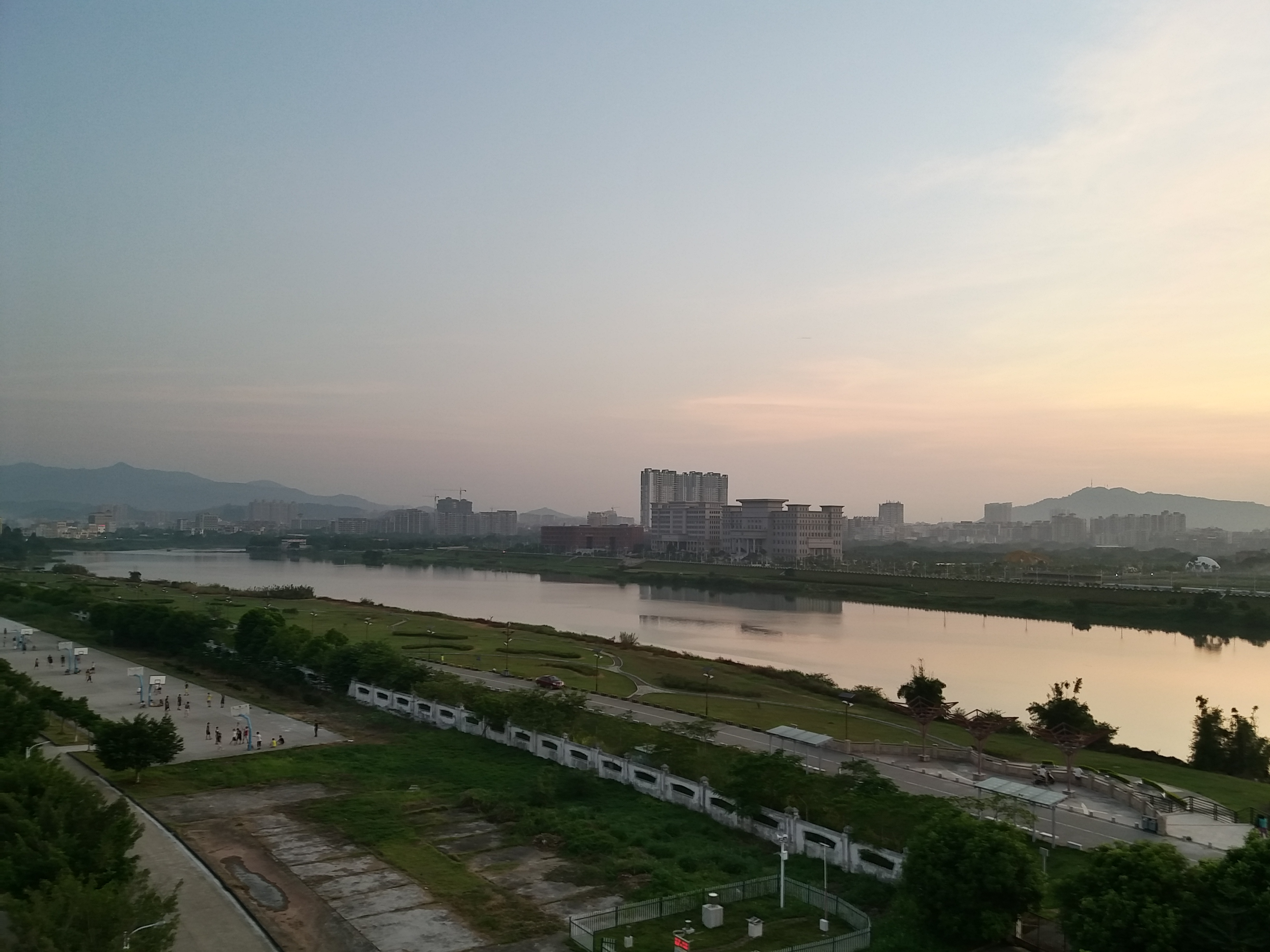 中文（中国大陆）: 对岸为从化市区